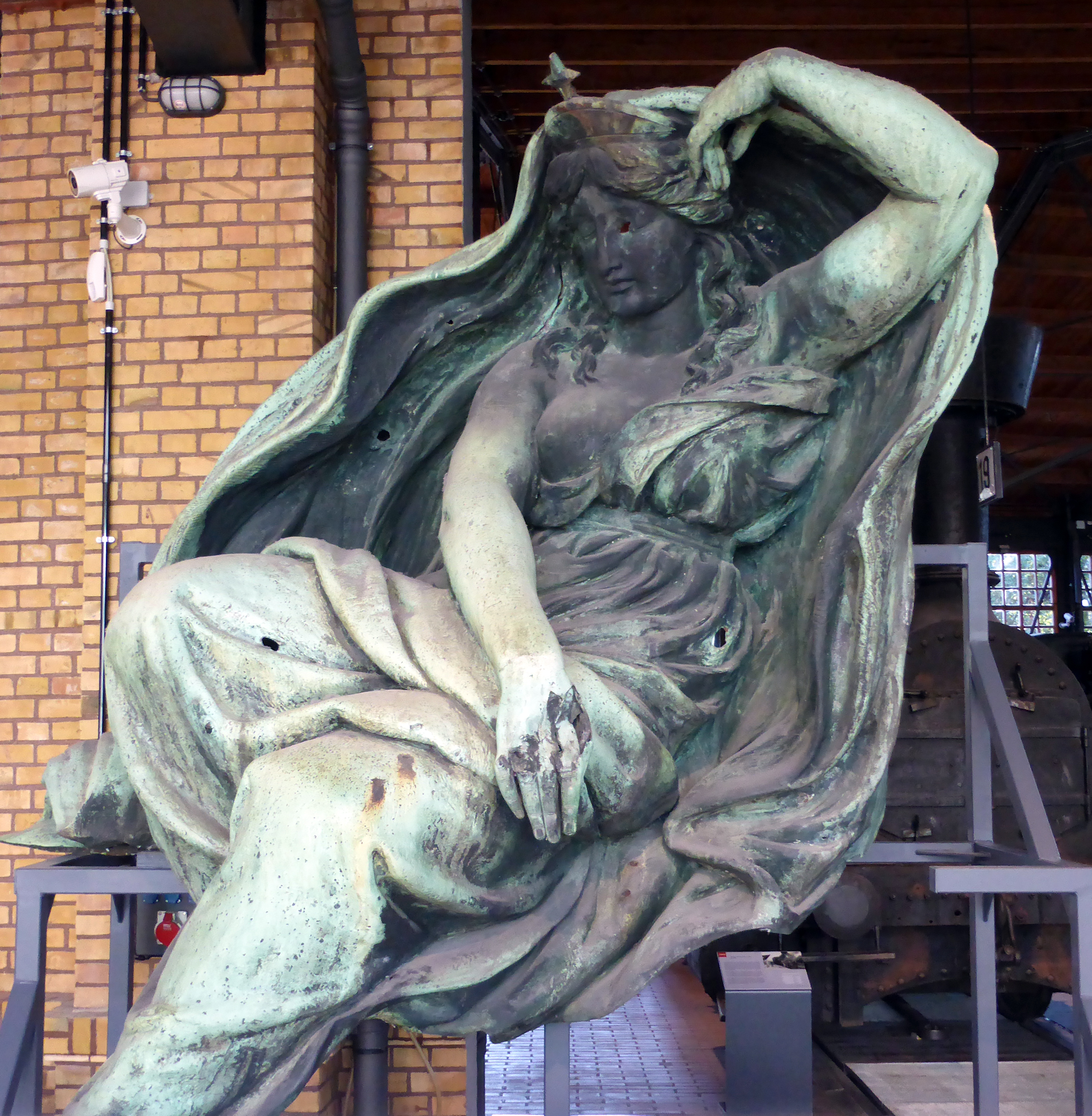 Figurengruppe Tag und Nacht. Galvanoplastik aus Kupfer vom Bildhauer Ludwig Brunow von 1880. Standen auf dem Anhalter Bahnhof (Berlin). Heute ausgestellt im Deutschen Technikmuseum Berlin. Wikipedianische KulTour am 10. Oktober 2015 in der Ausstellung des Museums.